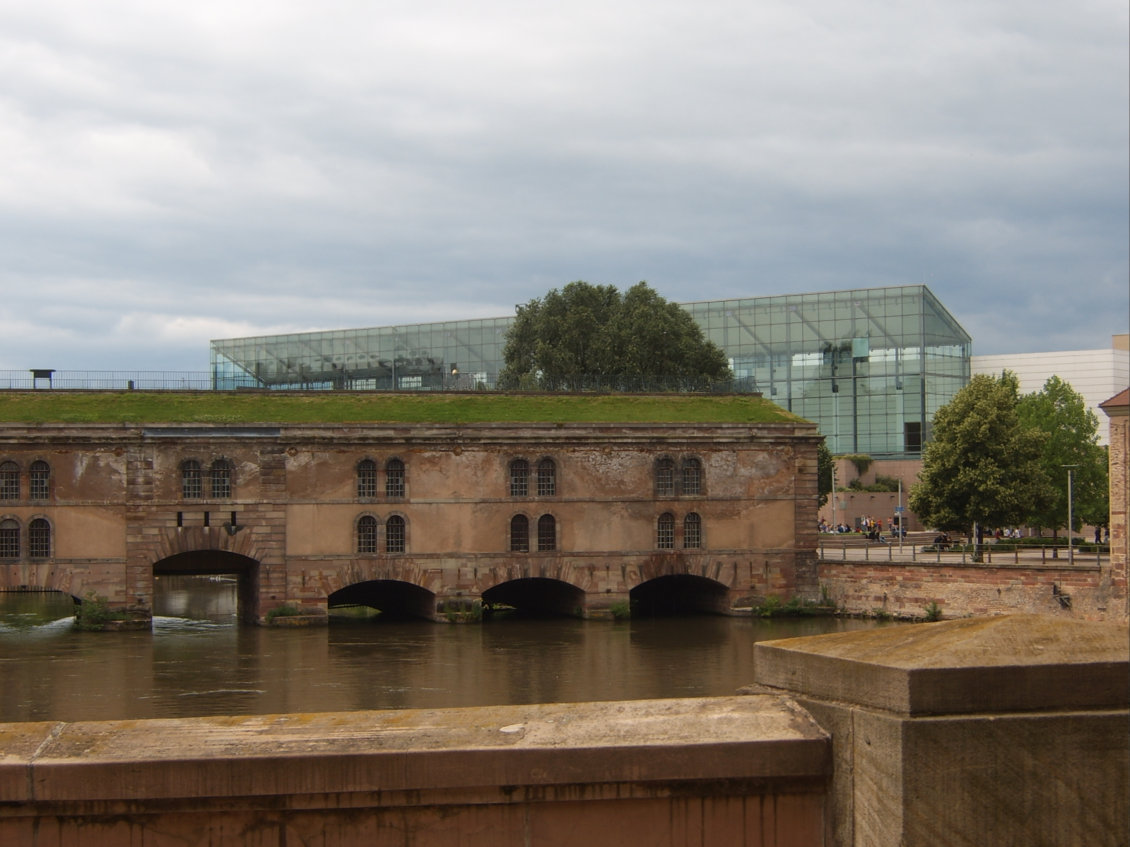 ponts couverts de Strasbourg et musée d'art moderne à l'arrière plan